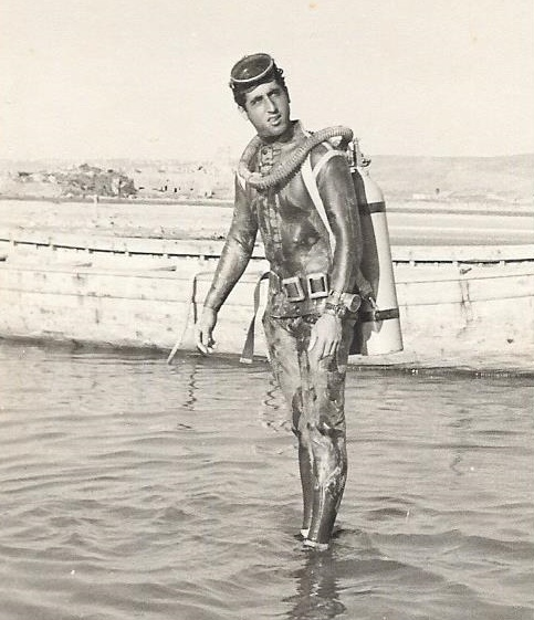 גדי שפי לקראת צלילה במפרץ עתלית